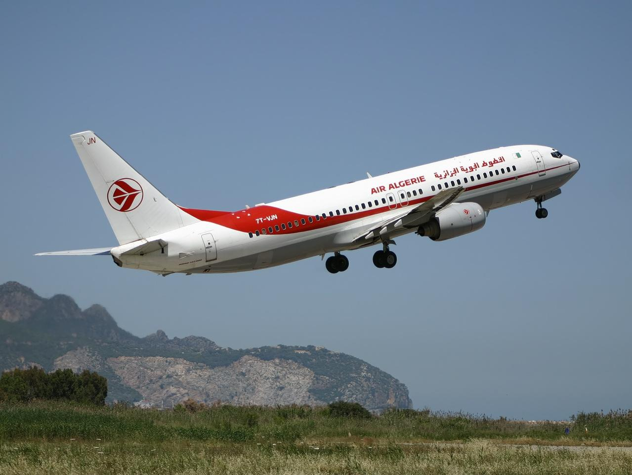 Air Algerie Décollage Bejaia